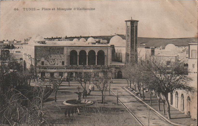 Médina de Tunis Place et Mosquée Halfaouine